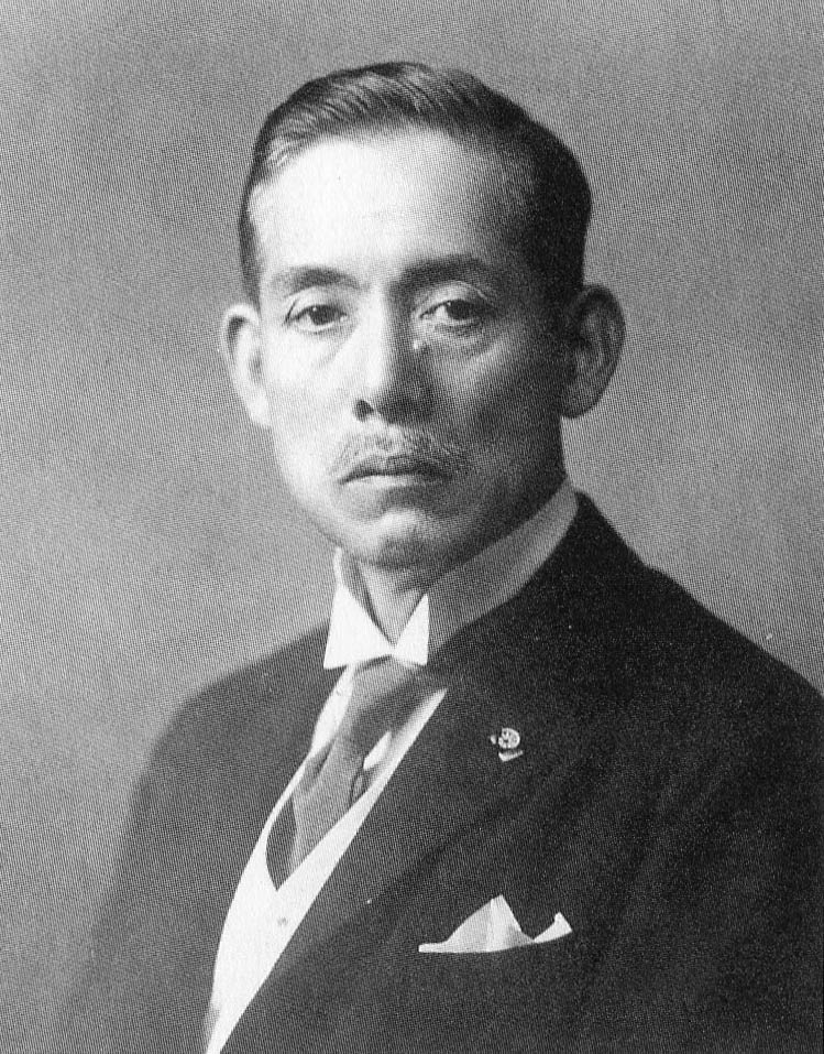 川崎克画像